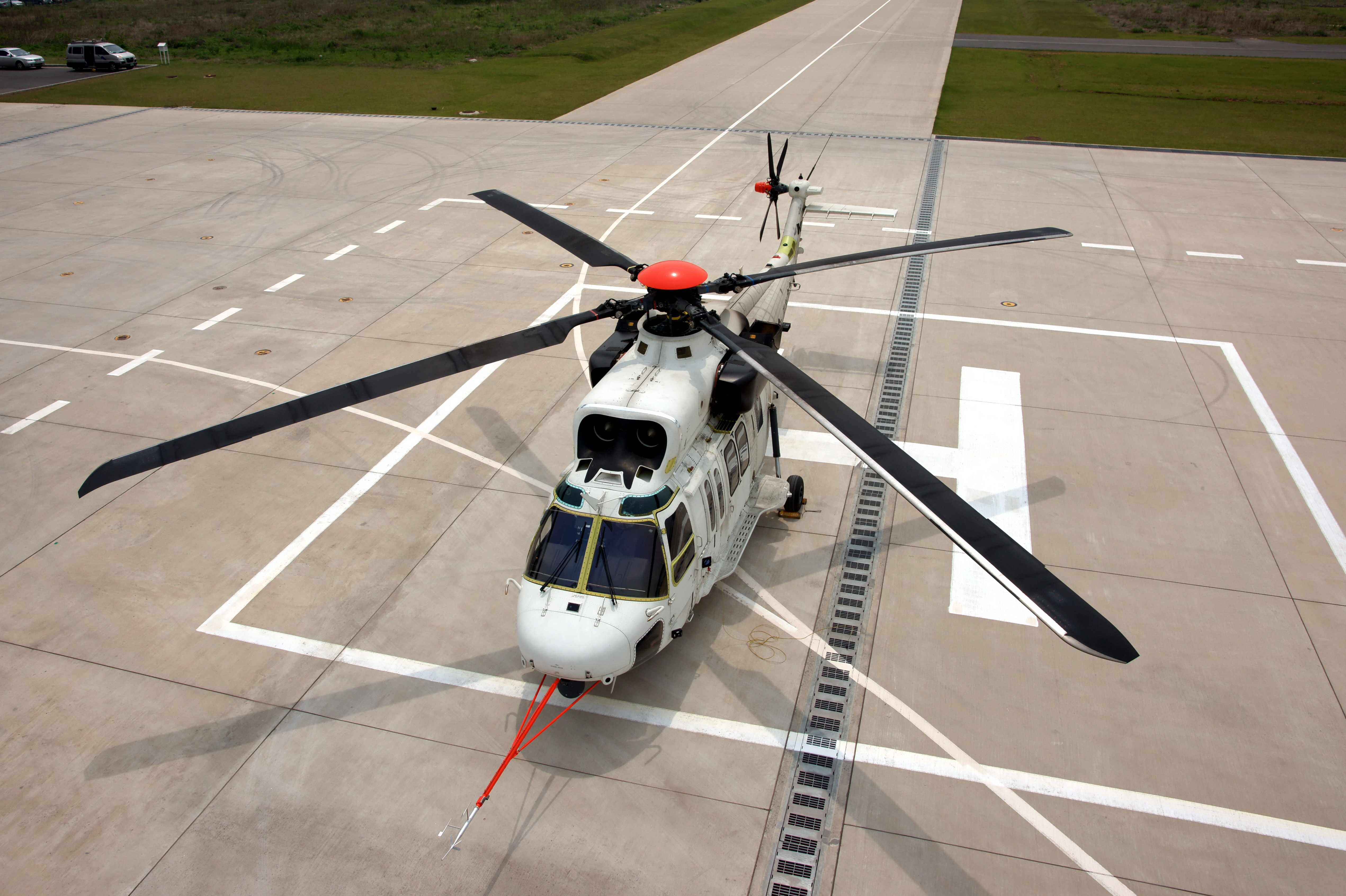 수리온 프로토 타입